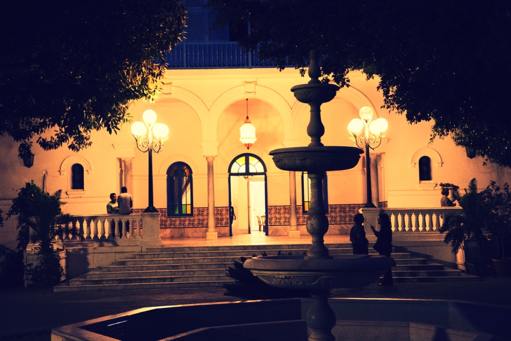 Partie historique dit « Kasr Essaâda » à La Marsa avec une zone de servitude étendue jusqu’à la clôture du palais conformément à l’article 45 du code du patrimoine, La Marsa